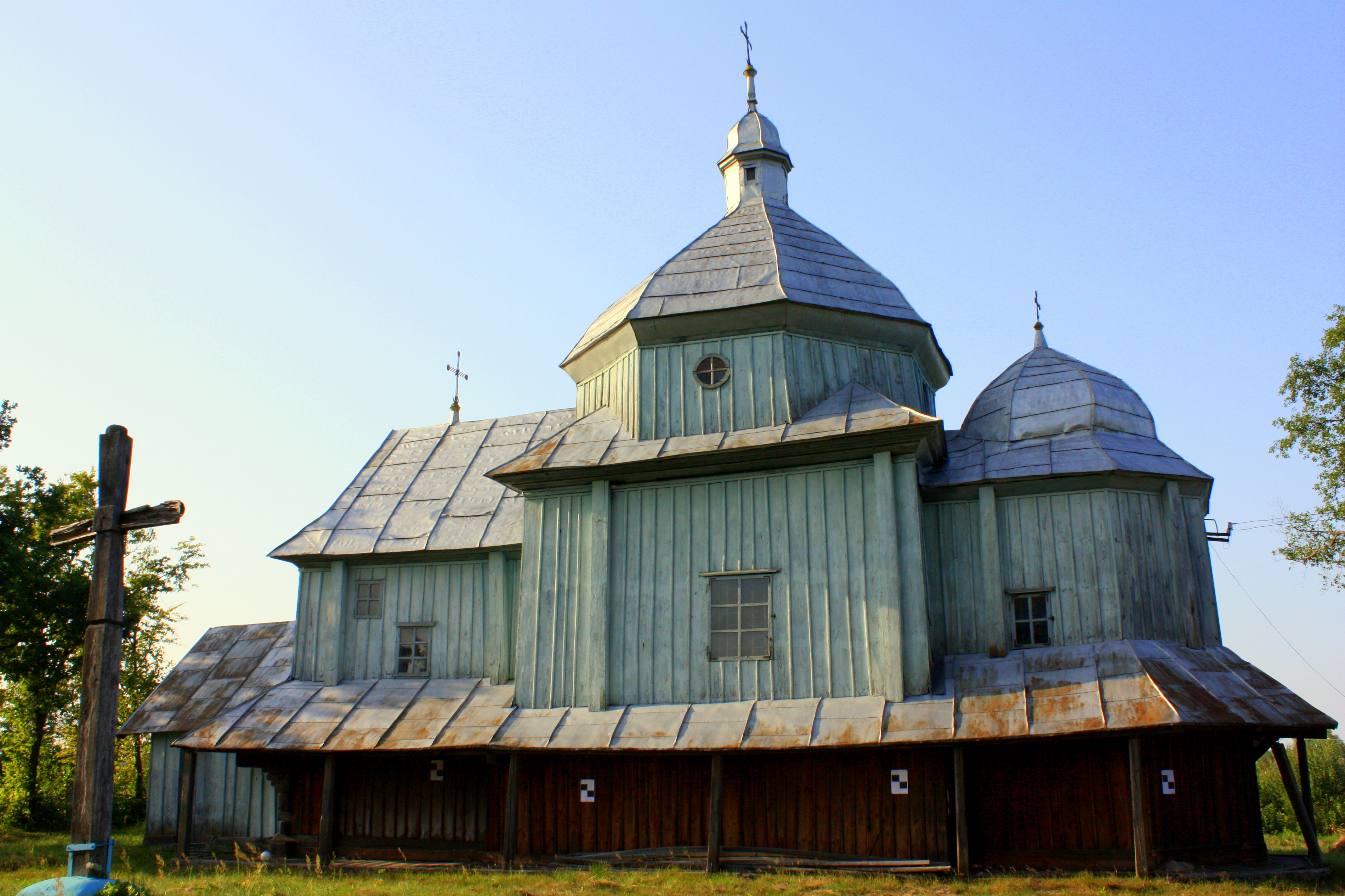 Церква Івана Богослова, Боложинів